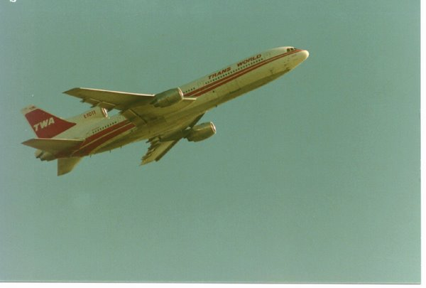 TWA